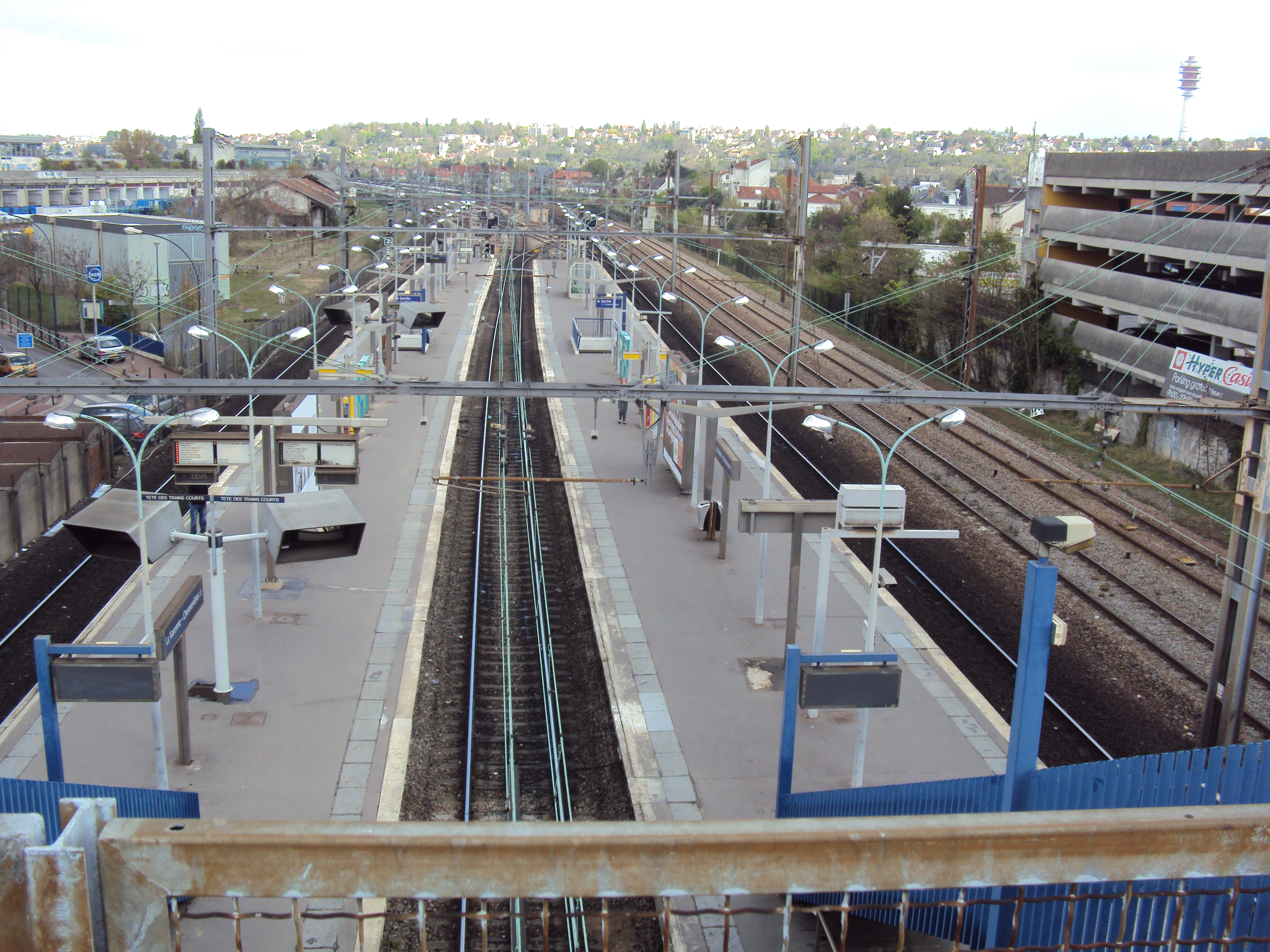 La Varenne Chennevières - Vue depuis le parking vers le Nord